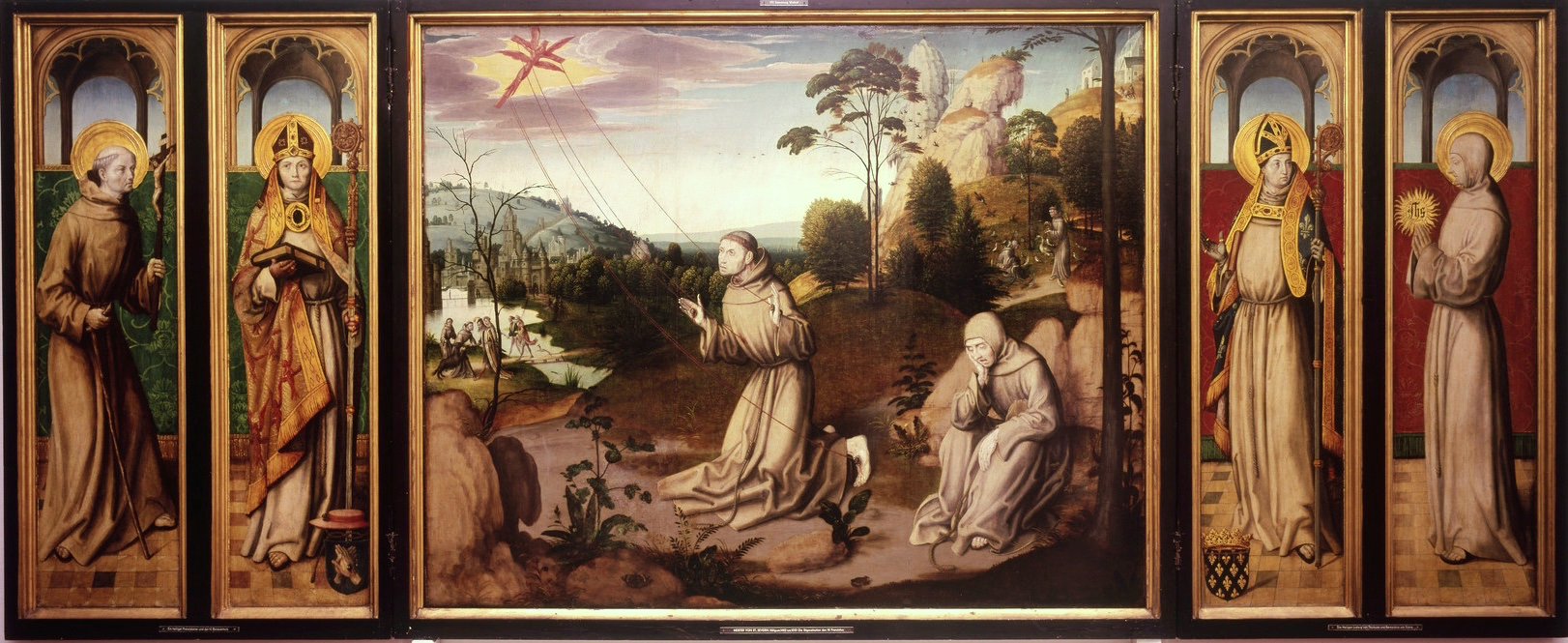 Maître de la Légende de sainte Ursule - Retable de saint François - Retable déployé